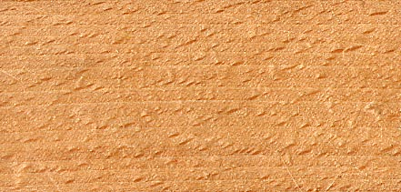 Beech wood